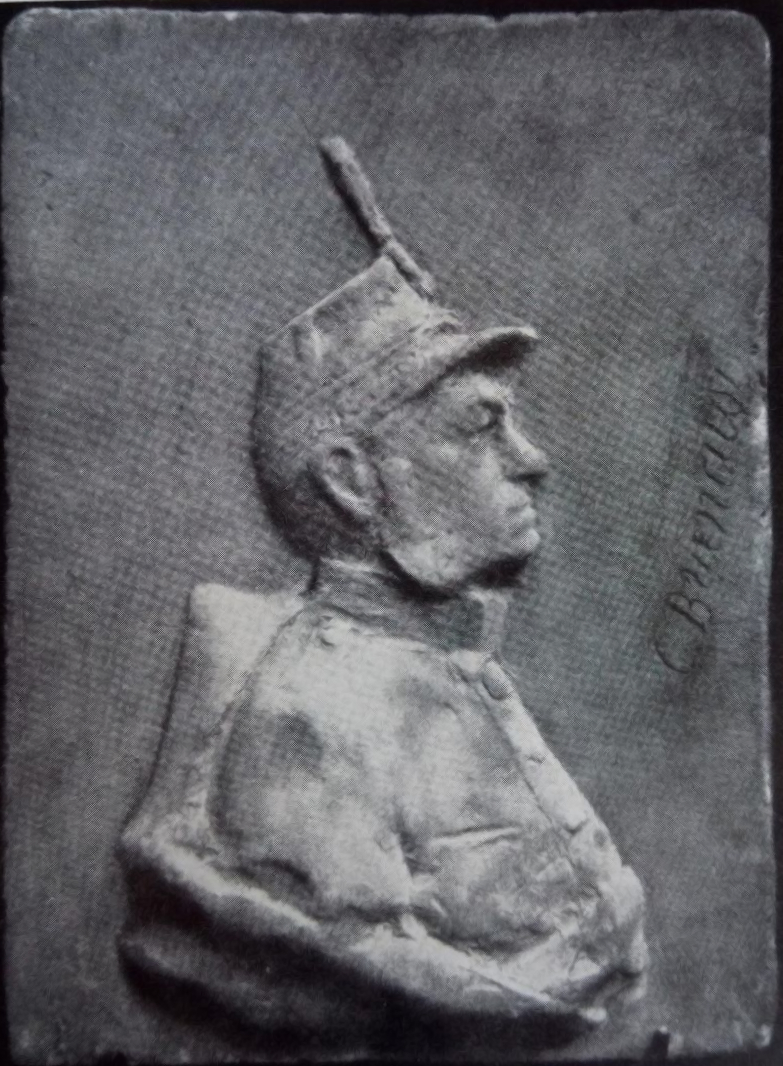 Studiu pentru portretul generalului doctor Carol Davila, din ghips - Muzeul de Arta al Romaniei.